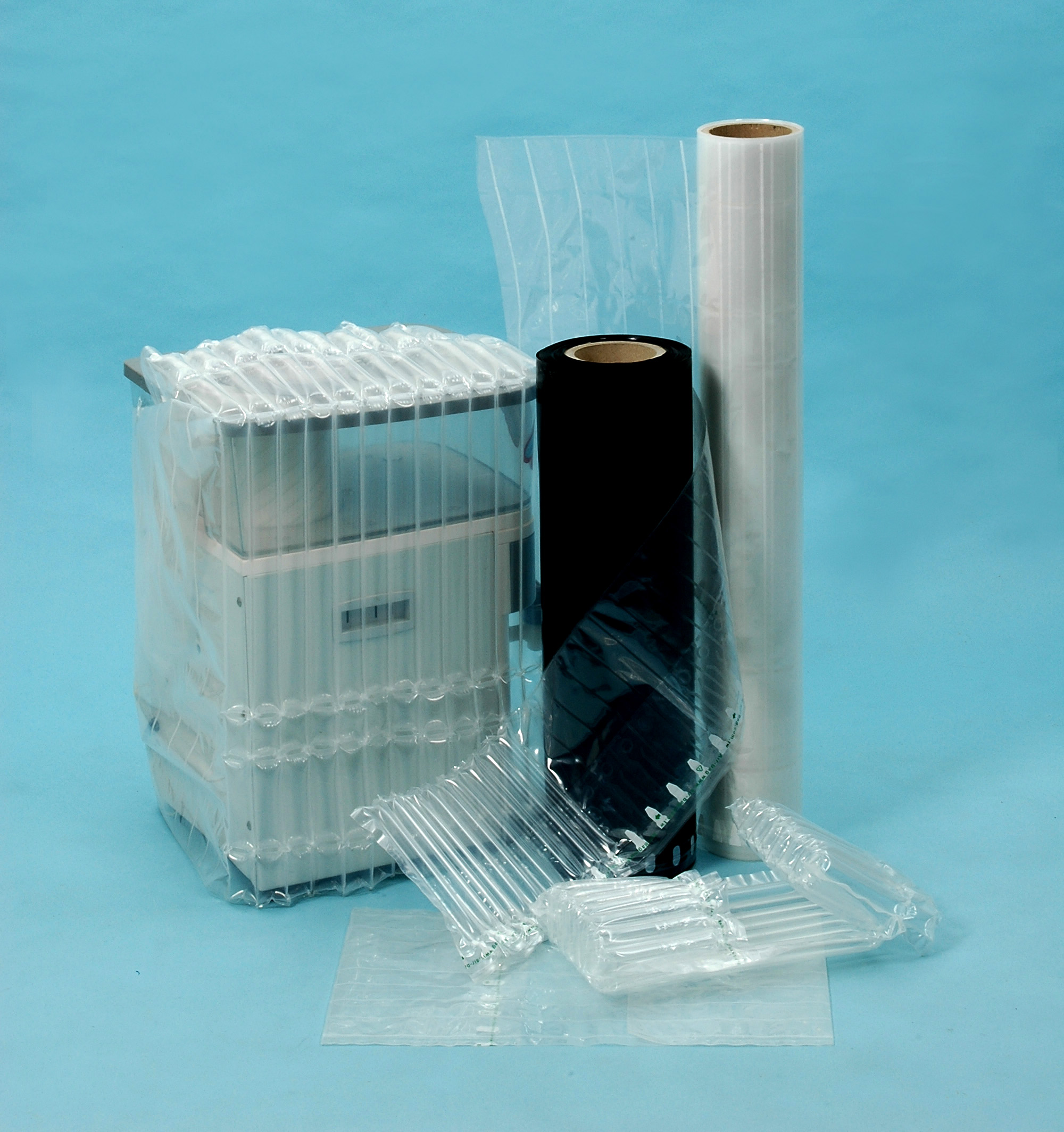 充氣緩衝材料，用來做包裹防護。未充氣之前乃薄片狀之捲料，包裹後充氣即形成防護結構。